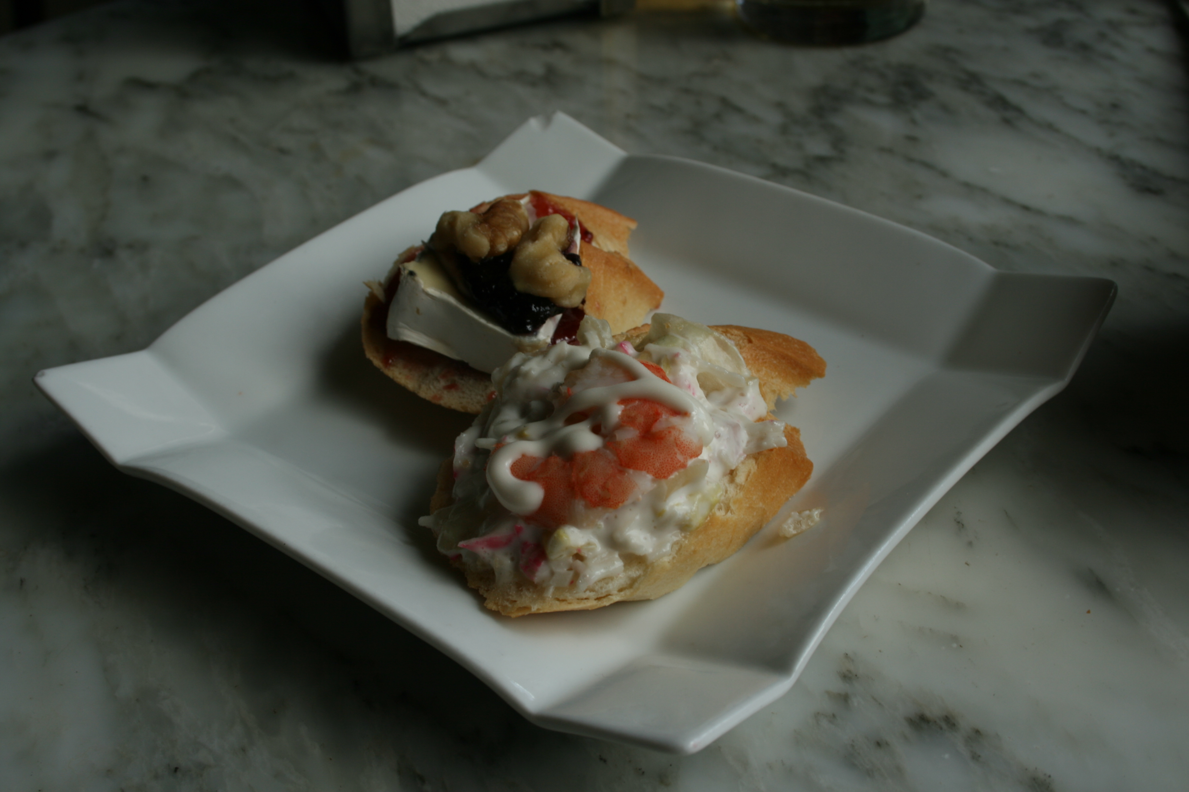 Tapas en Salamanca: - Primer plano: mahonesa con surimi y salmón - Segundo plano: morcilla con queso